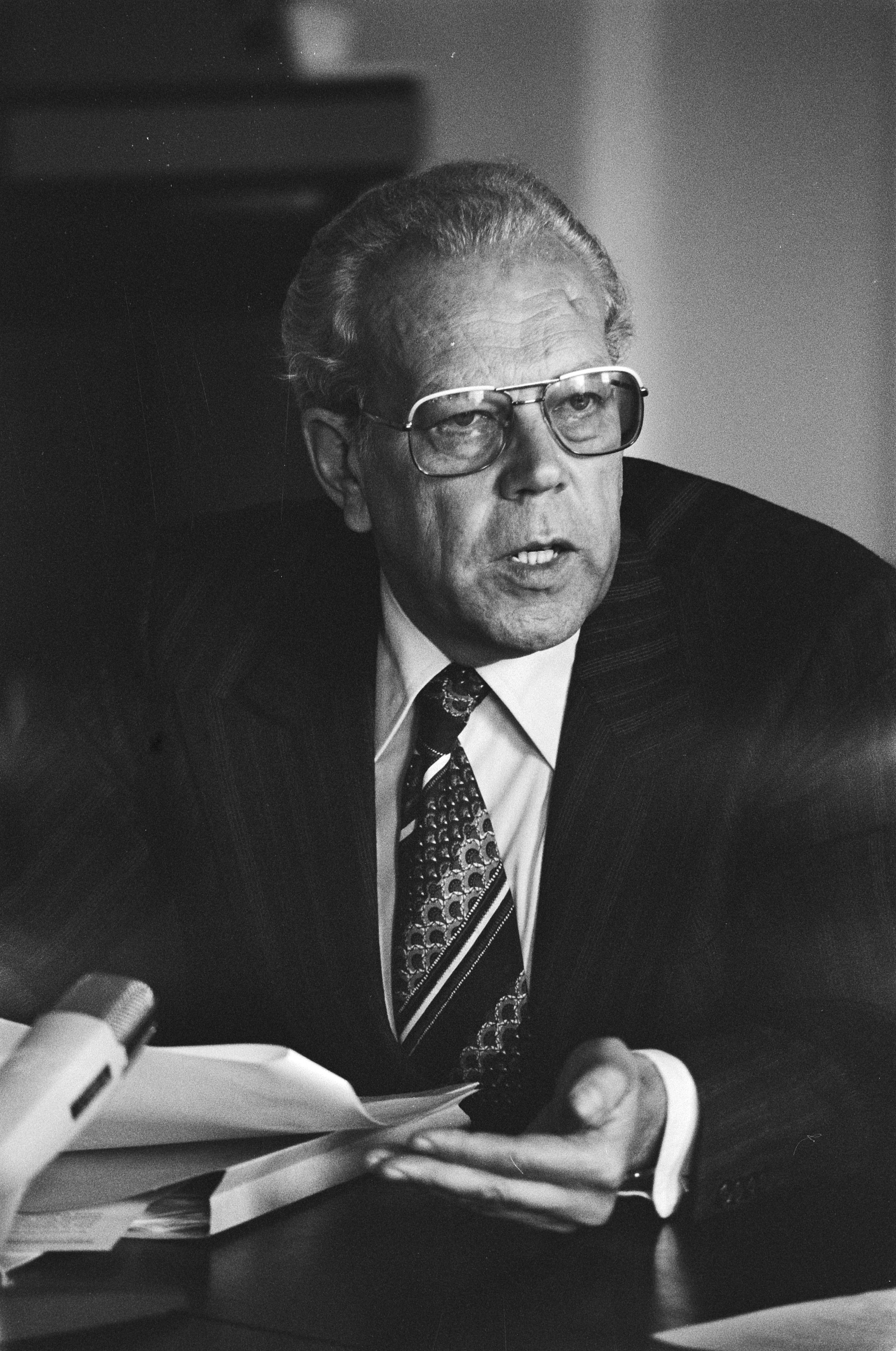 Collectie / Archief : Fotocollectie Anefo Reportage / Serie : Informateur professor Albeda brengt verslag uit aan koningin Juliana op Huis ten Bosch Beschrijving : Persconferentie professor Wil Albeda Datum : 27 juli 1977 Trefwoorden : informateurs, persconferenties Persoonsnaam : Albeda, Wil Fotograaf : Suyk, Koen / Anefo Auteursrechthebbende : Nationaal Archief Materiaalsoort : Negatief (zwart/wit) Nummer archiefinventaris : bekijk toegang 2.24.01.05 Bestanddeelnummer : 929-2843